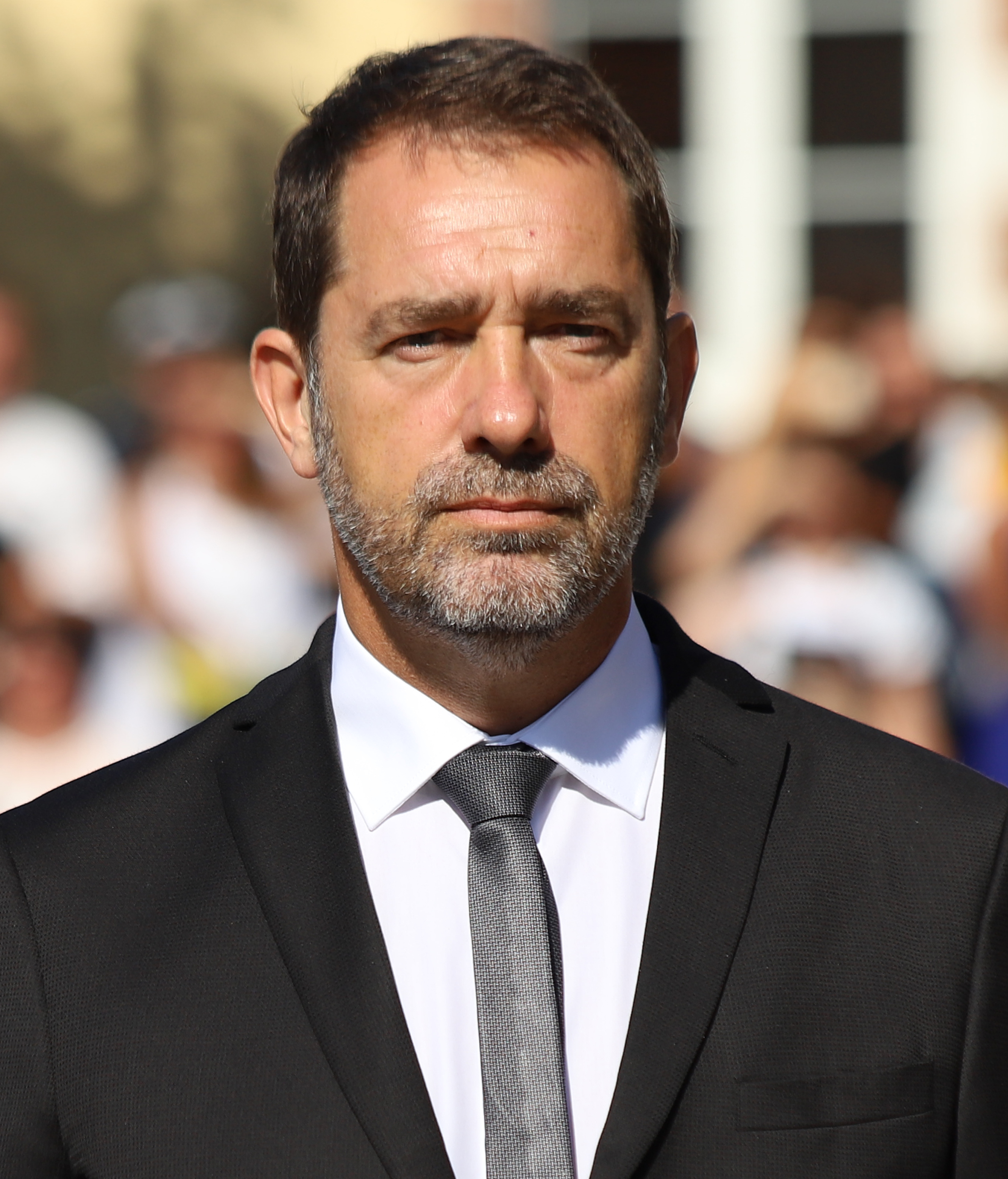 Christophe Castaner, ministre de l'Intérieur, à l'école national de police de Sens, le 30 août 2019 à l'occasion de la cérémonie de sortie de la 250e promotion de gardiens de la paix.